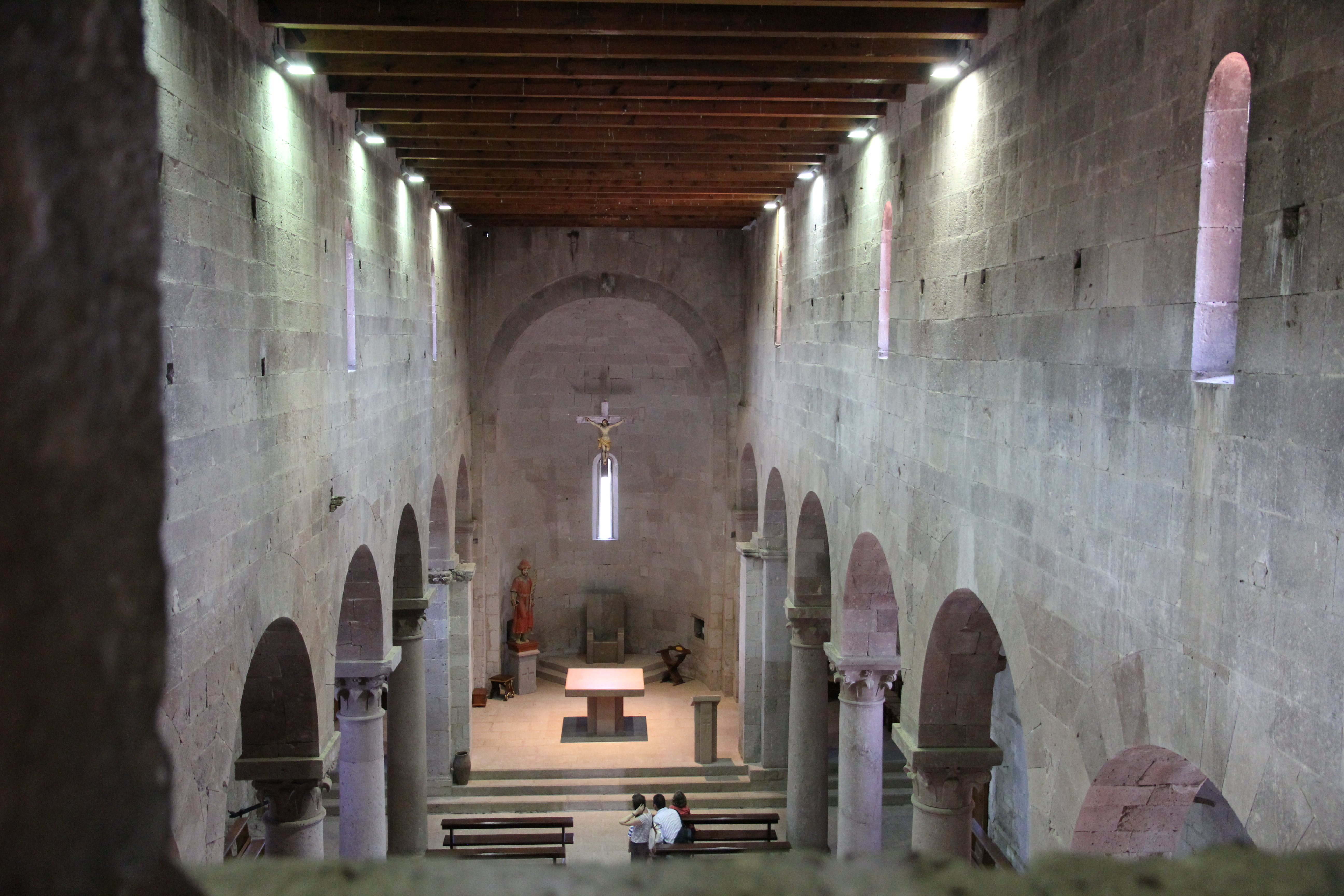 Ozieri - Basilica di Sant'Antioco di Bisarcio